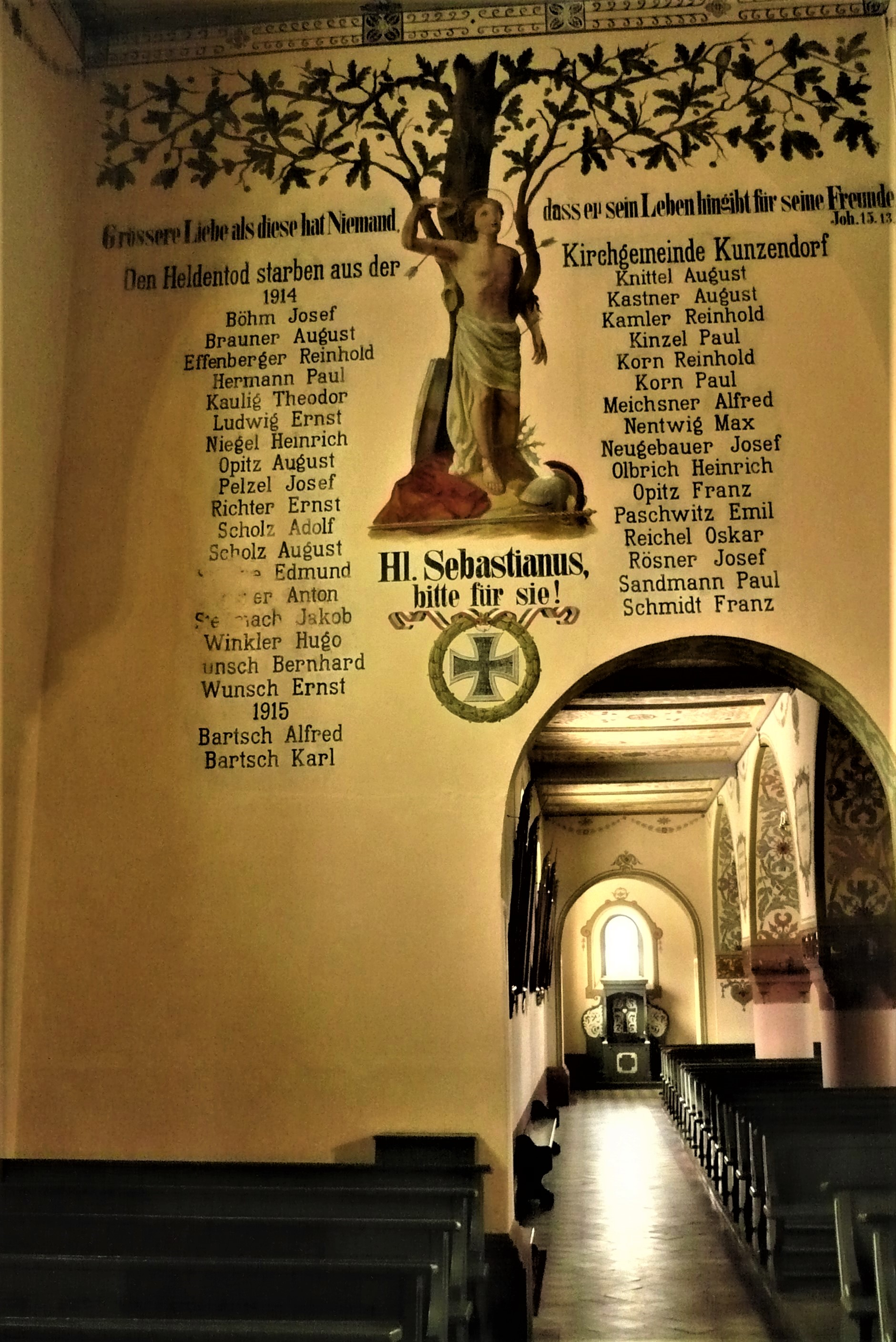 Kościół Barbary w Nowej Rudzie